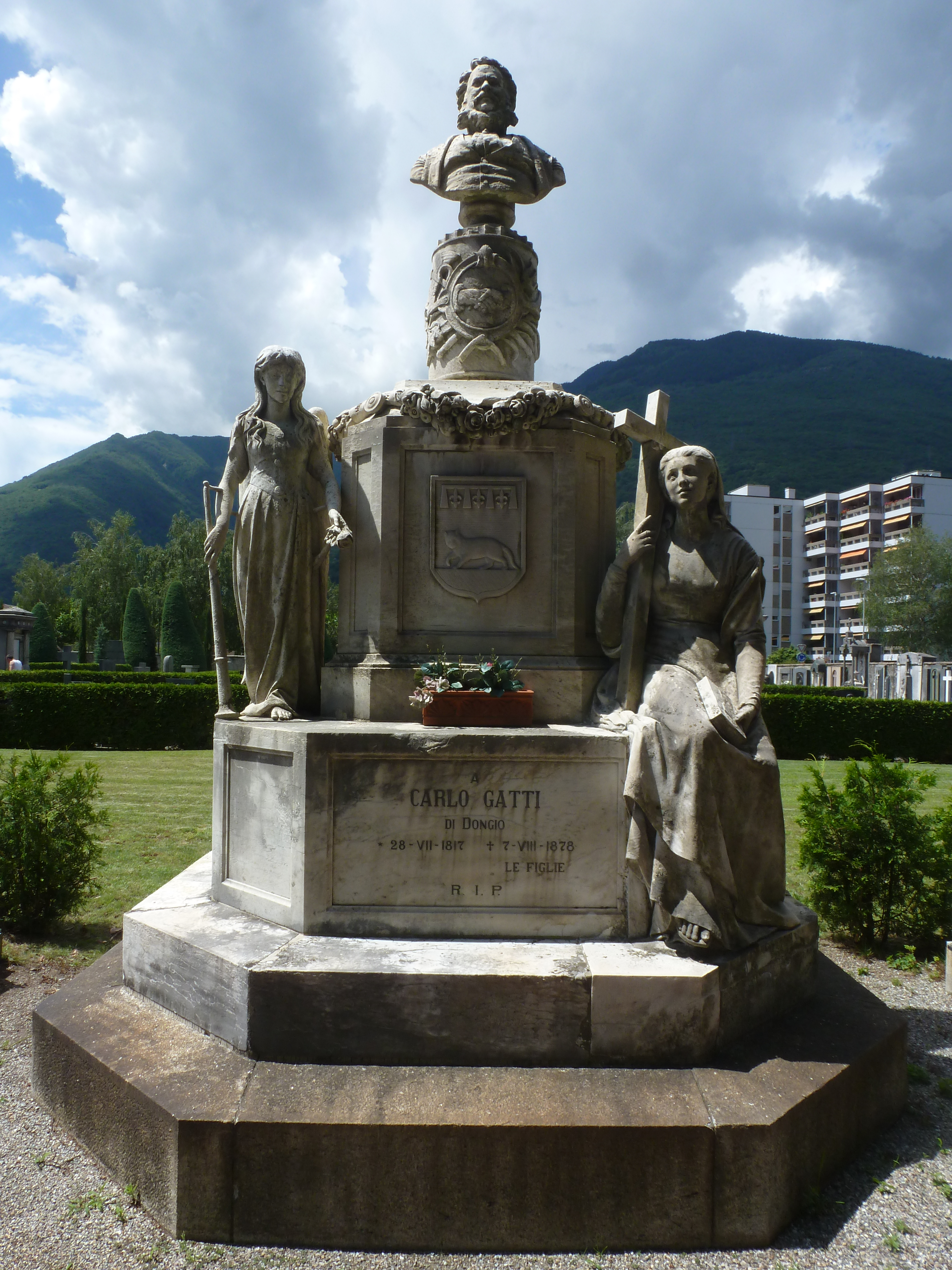 Grabmal von Carlo Gatti (d.1842) auf dem Stadtfriedhof von Bellinzona. Carlo Gatti (1817–1878) was a Swiss entrepreneur in the Victorian era.